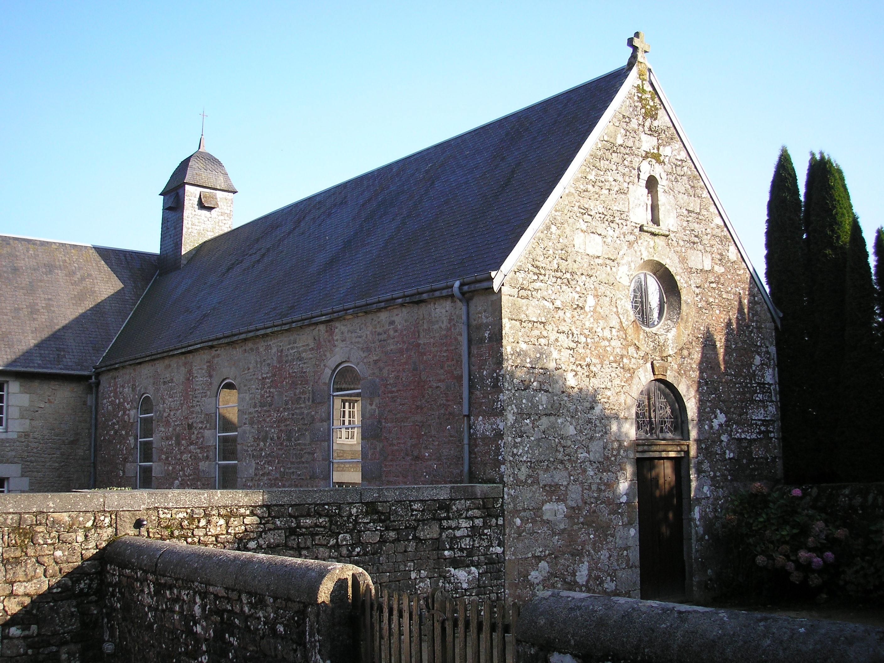 Saint-Sever-Calvados (Normandie, France). La chapelle de l'Ermitage.